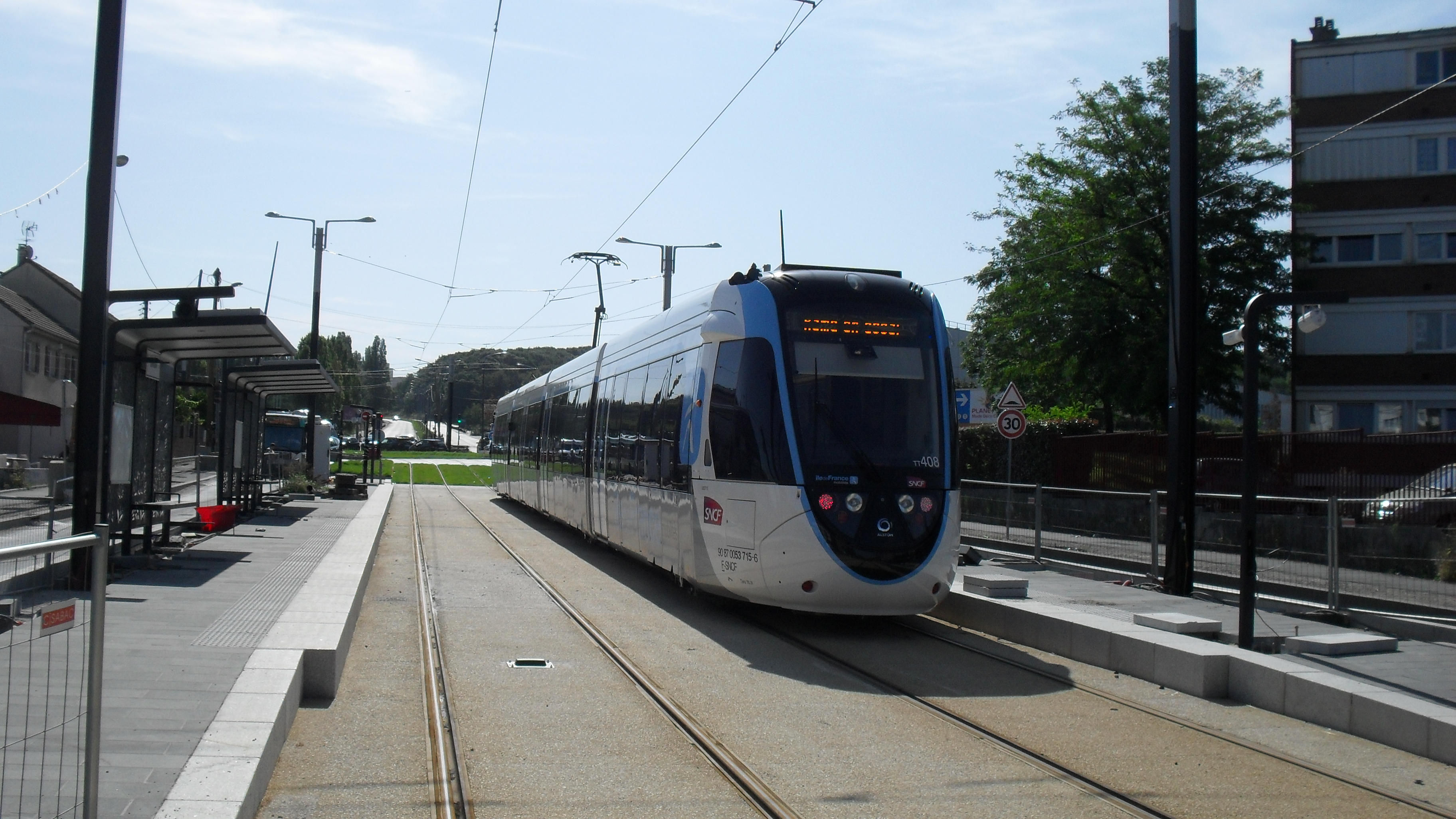 Tram-train U53700 en essais à la future station Léon Blum